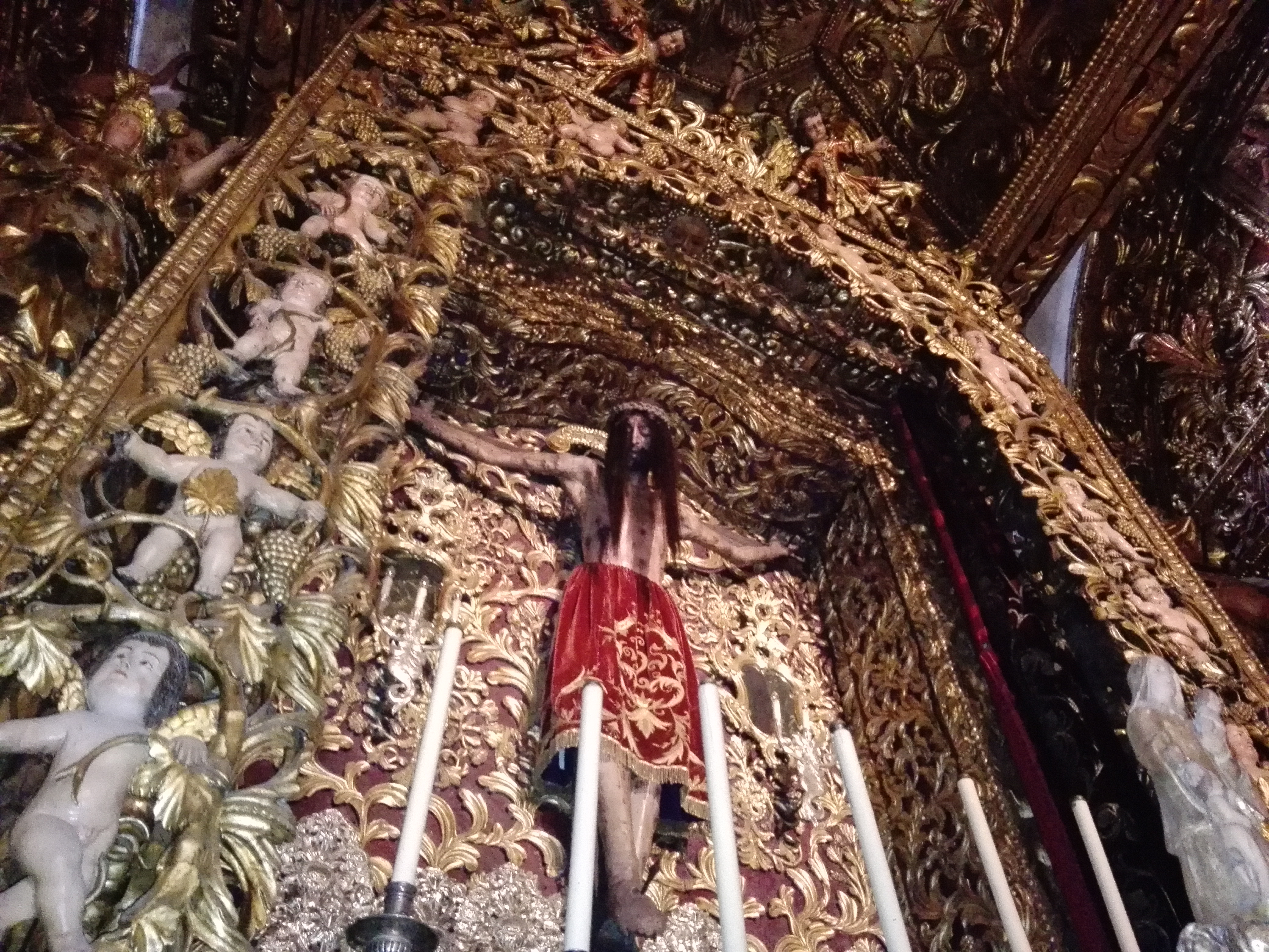 Santo Cristo de Ourense